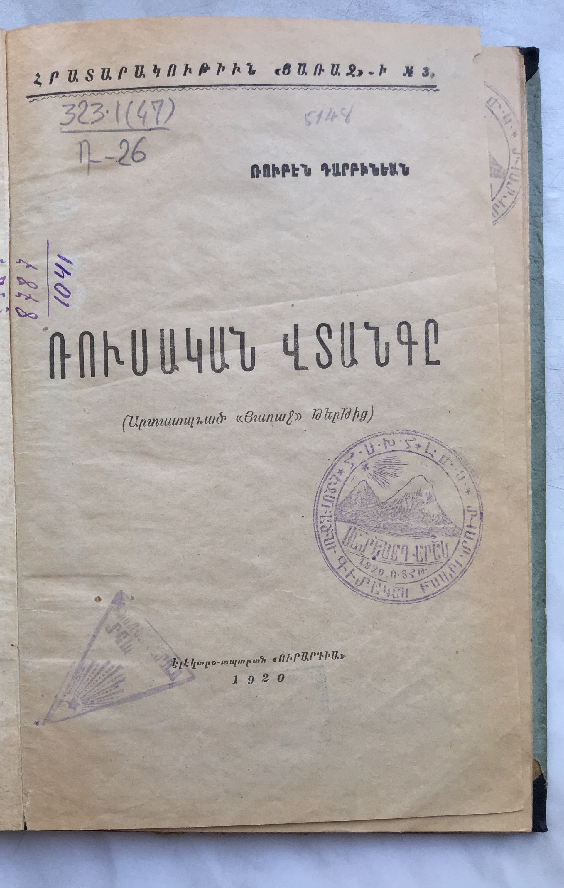 Հայ հասարակական-քաղաքական գործիչ, Հայաստանի Հանրապետության արդարադատության նախարար (1920) Ռուբեն Դարբինյանի 1920 թվականին լույս տեսած «Ռուսական վտանգը» գիրքը